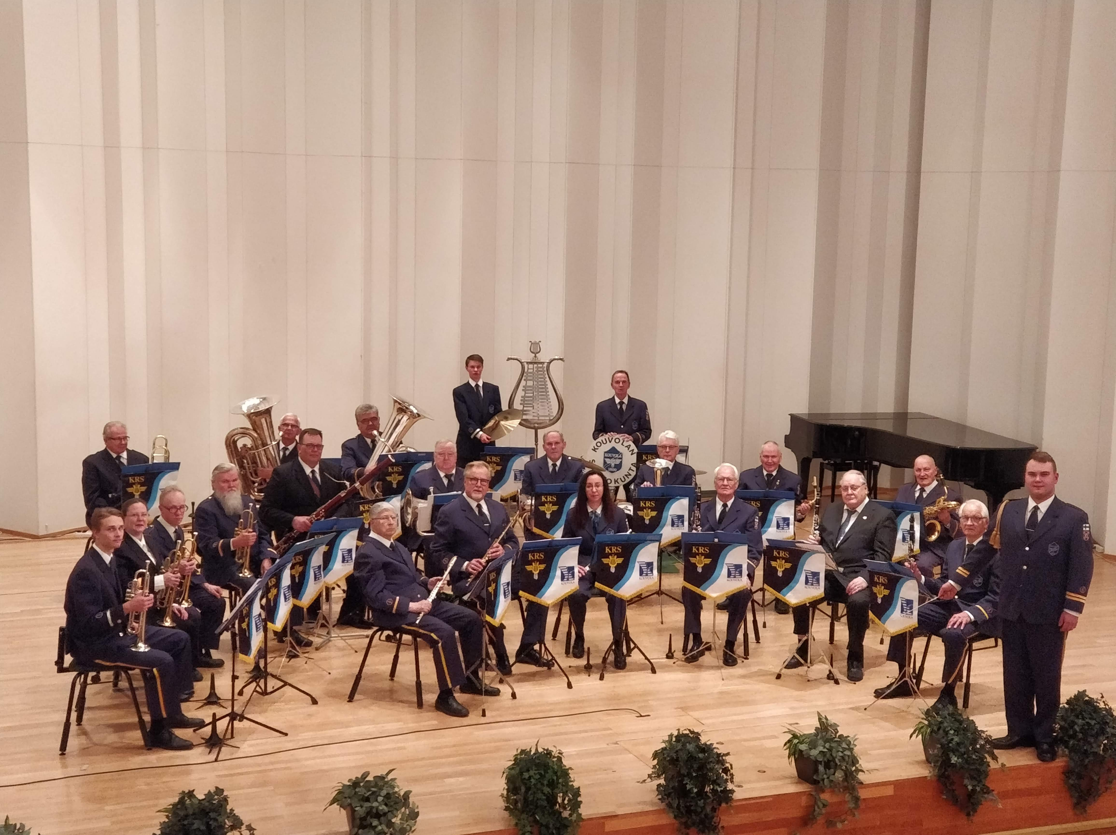 Kouvolan Soittokunta syksyllä 2019